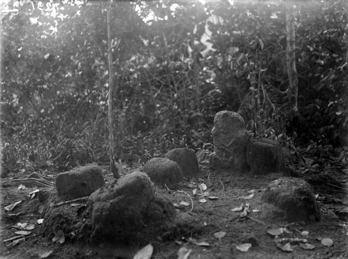 Negatief. Megalitisch beeld en megalieten ten noorden van het Ranau-meer